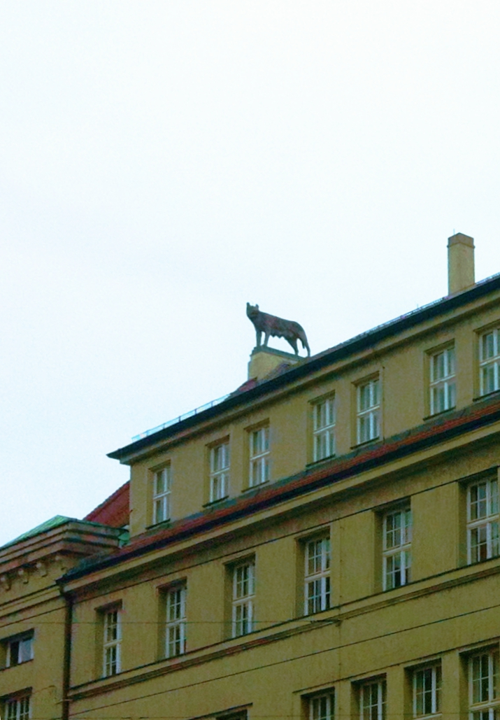 Die Kapitolinische Wölfin auf dem Dach des Melanchthon-Gymnasiums Nürnberg